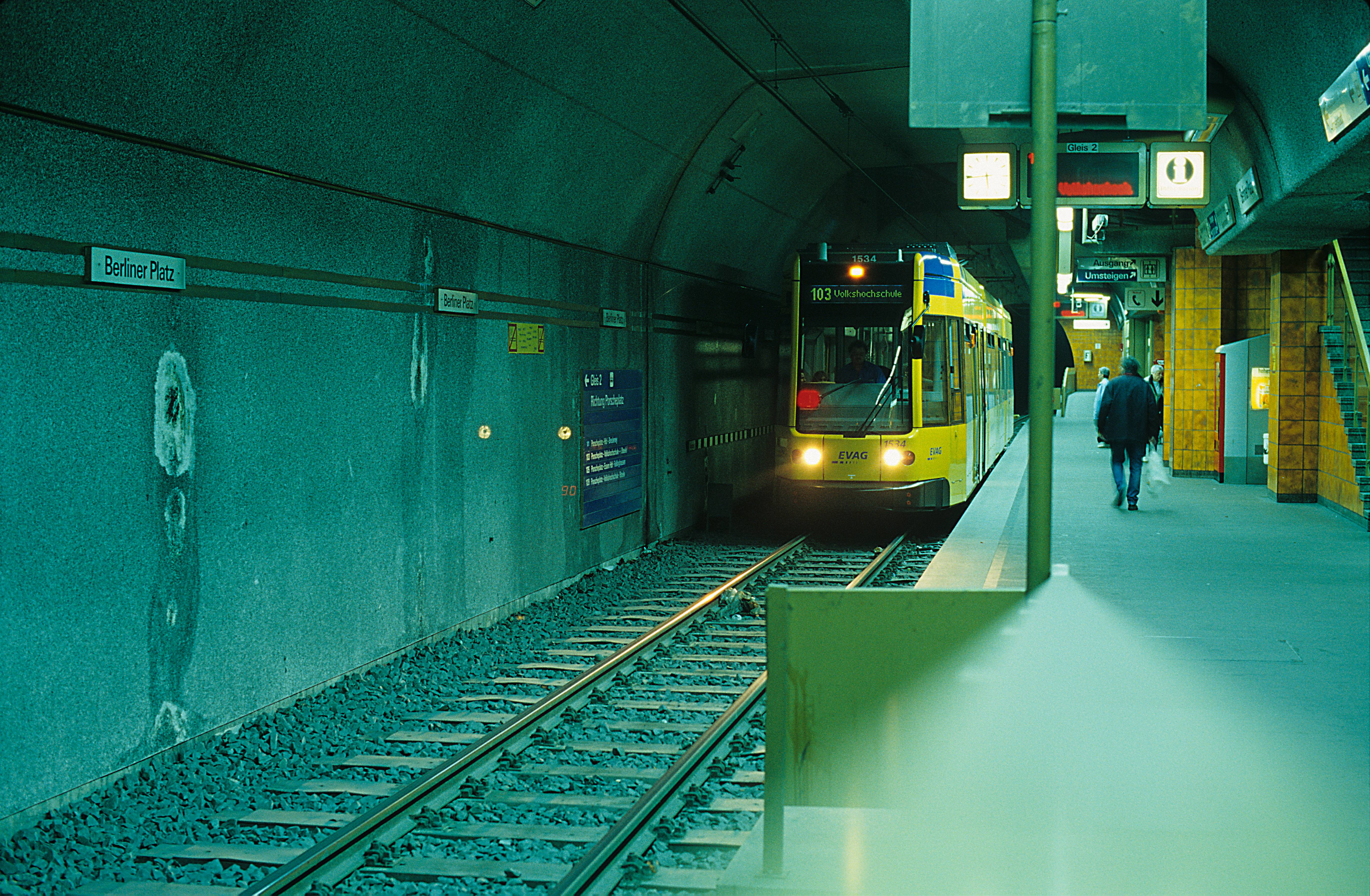 Zug der Linie 103 zur Volkshochschule Die Schwellen sind bereits für den Regelspurbetrieb ausgelegt. Ob dieser jemals aufgenommen wird, ist sehr fraglich.